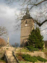 Eglise de Rougegoutte (Territoire de Belfort, France) Photo prise le 26 mars 2004 par LP90 Copyright : licence GFDL LP90